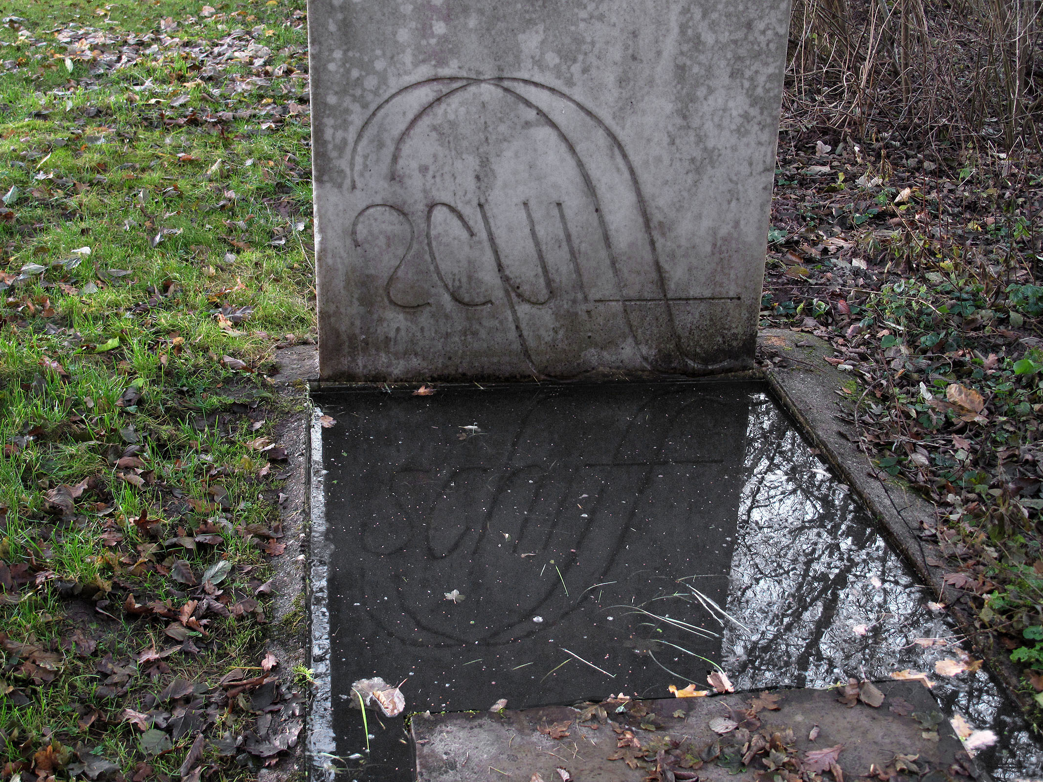 Ian Hamilton Finlay, Konkrete Poesie Station I:"Schiff", 1975, - Deutschland, Stuttgart-Vaihingen (Büsnau), Garten des Max-Planck-Instituts für Festkörperforschung - (Station VI: im Innenraum eines Gebäudes, Station VII: nicht mehr existent)